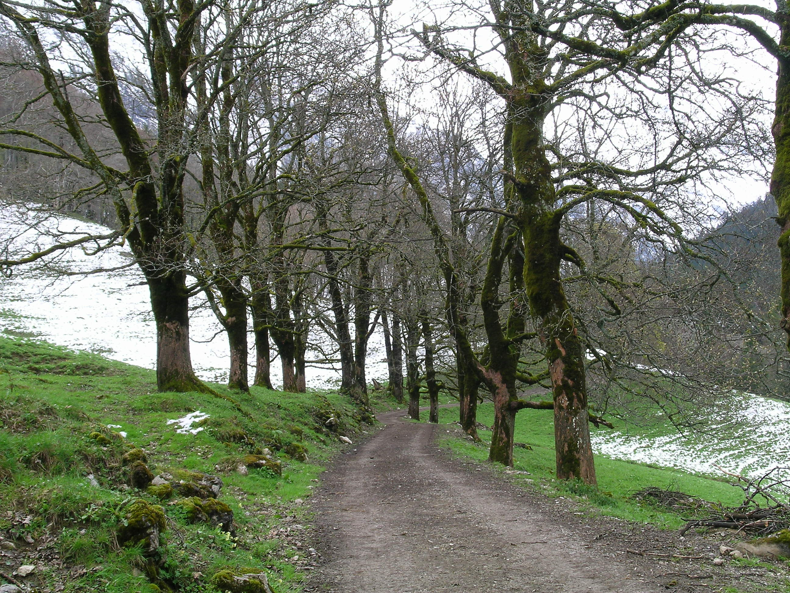 Dieterbachtal mit Weg zur Dietersbachalpe (1325 m ü. NN)